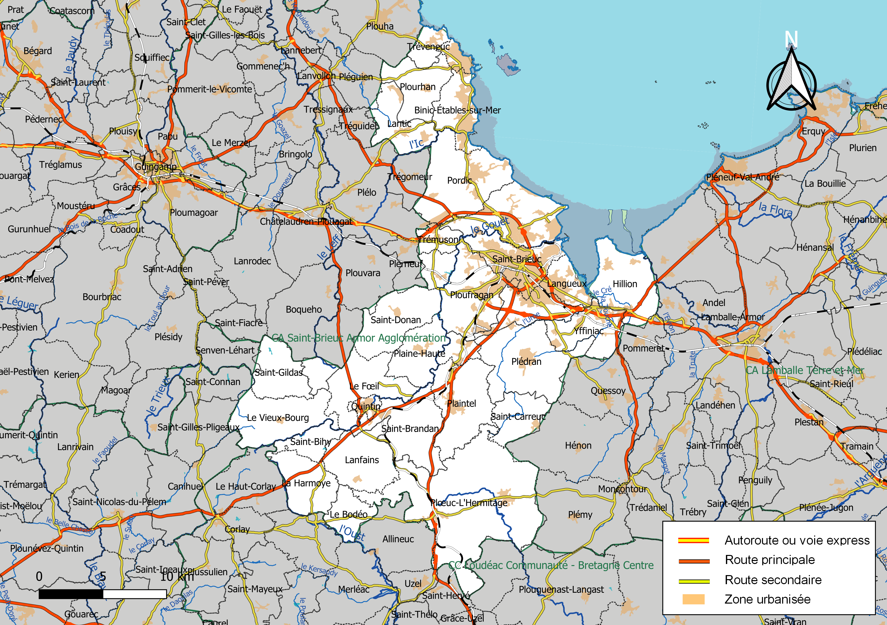 Carte géographique de l'intercommunalité Saint-Brieuc Armor Agglomération, département des Côtes-d'Armor, France. Composition au 1er janvier 2019.